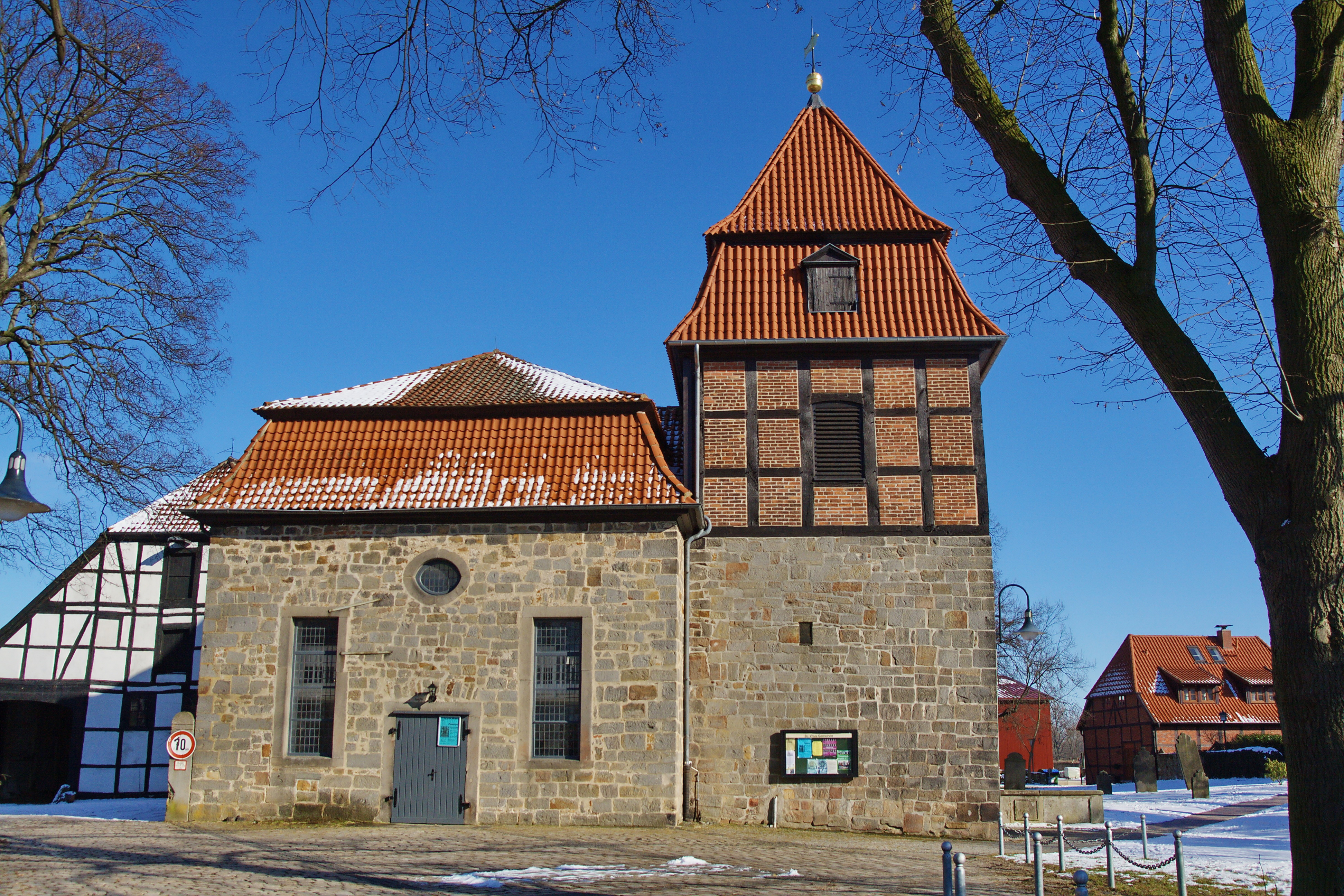 St. Vitus-Kirche in Wilkenburg (Hemmingen), Niedersachsen, Deutschland